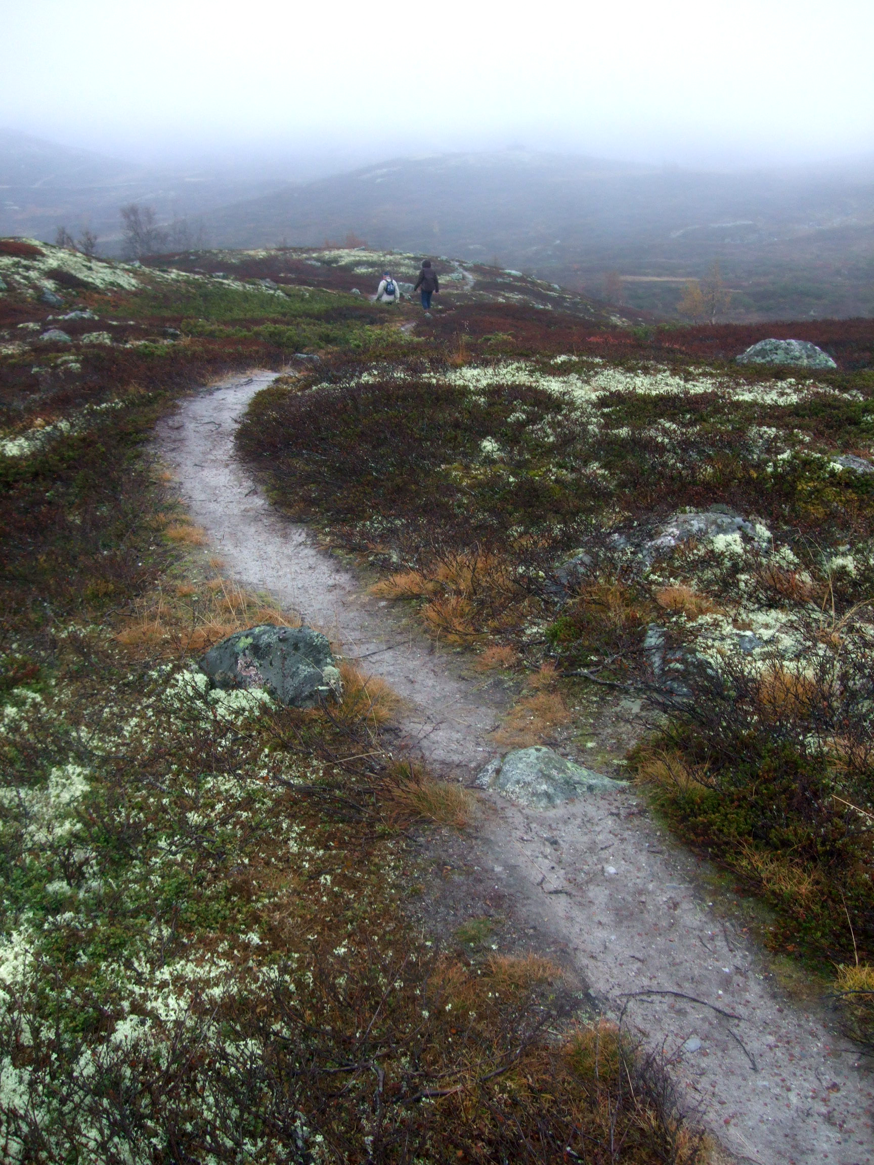 Sti i høyfjellet. Geilo.